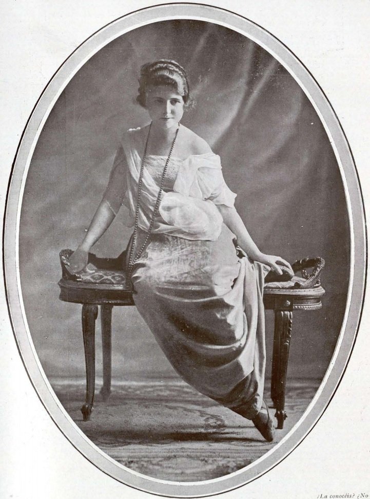 He aquí a Carmencita de Icaza y de León, que es algo así como la aurora de la vida, por Kaulak.